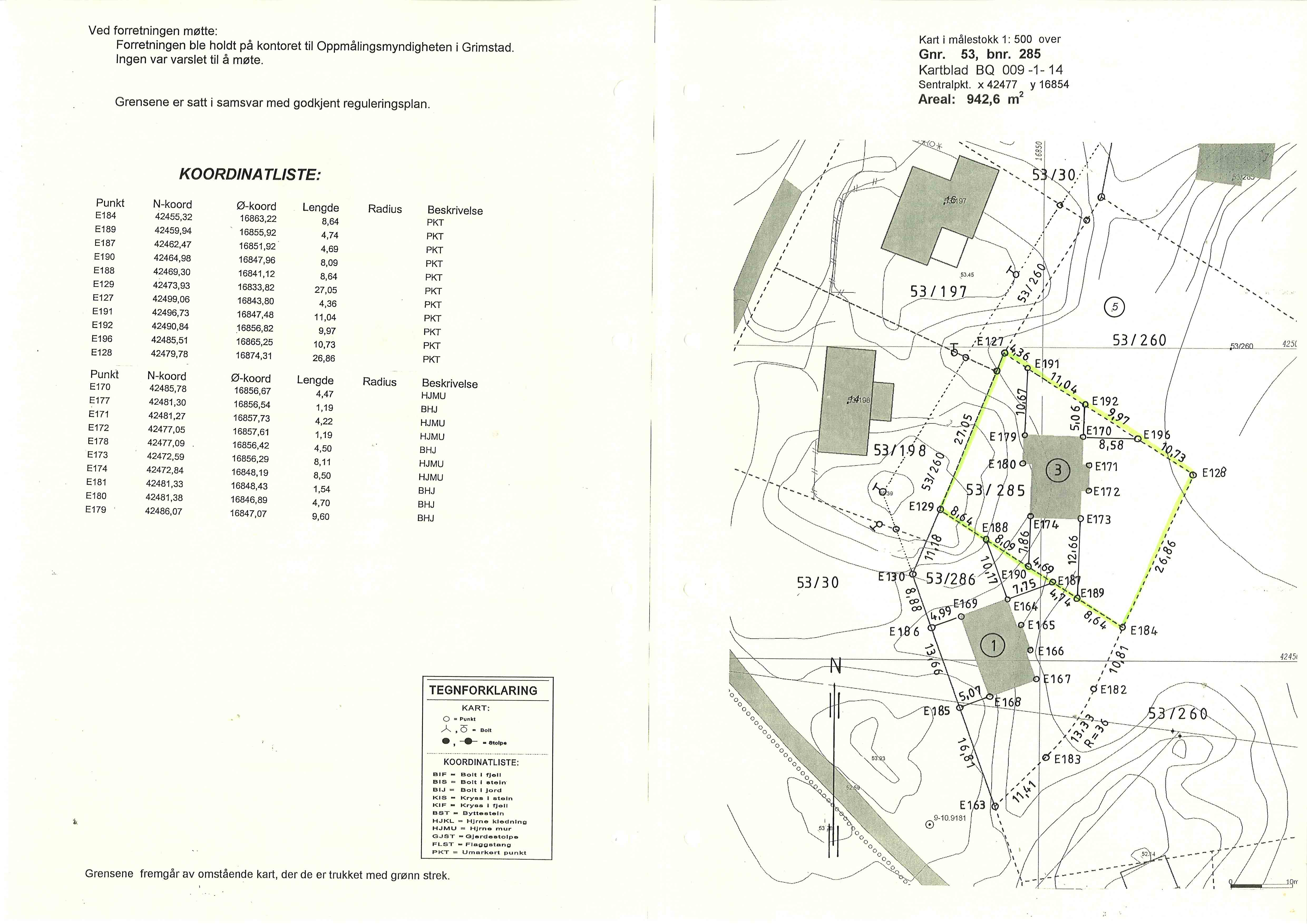 "Delingsforretning" Page 2-3